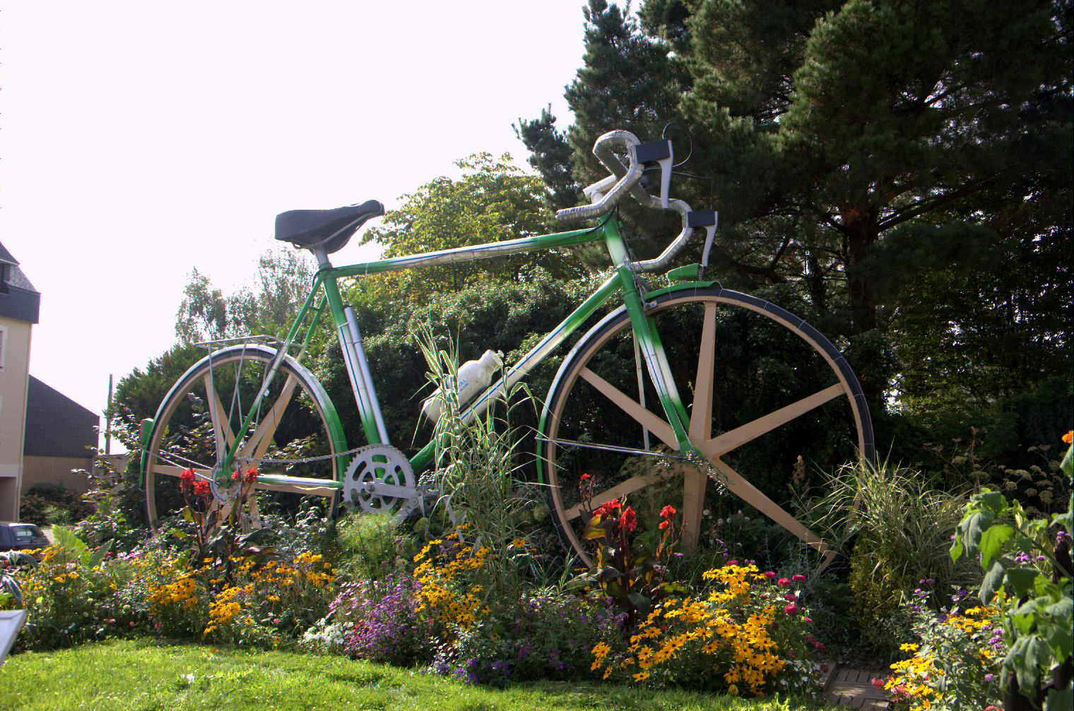 Photo du plus grand vélo du monde, à Noyal-sur-Vilaine.